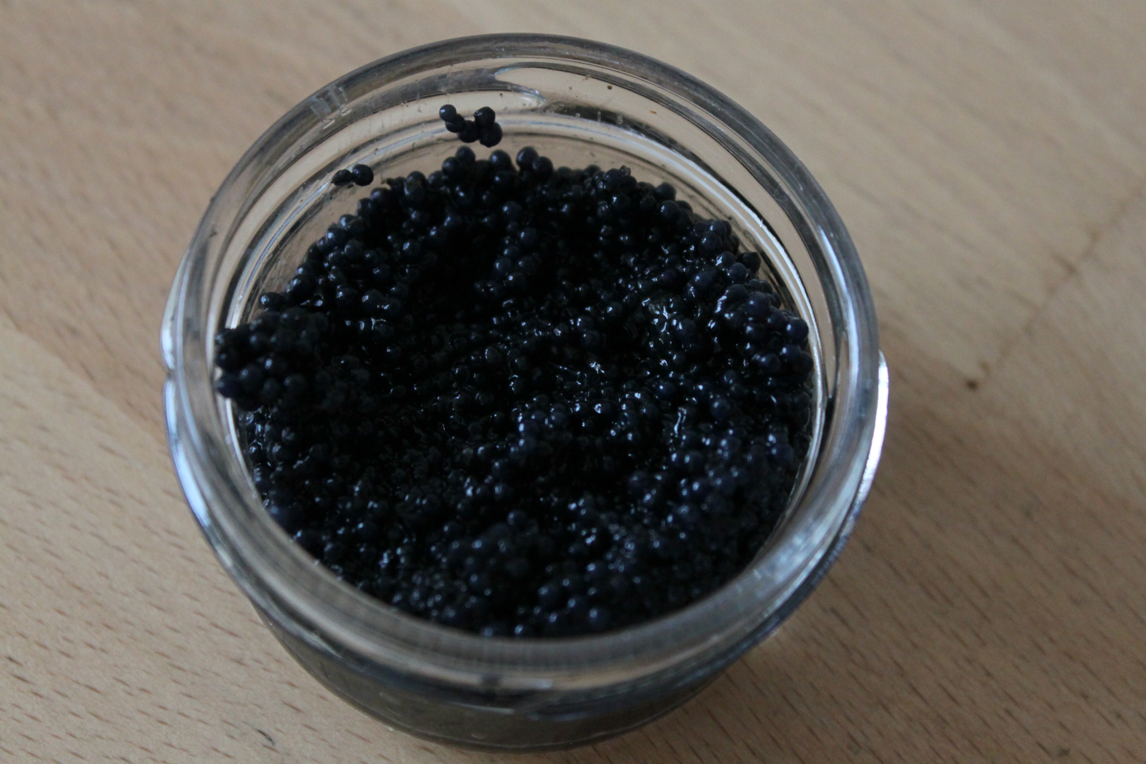 Kaviarersatz: Forellenkaviar; Kaviar aus Seehasenrogen